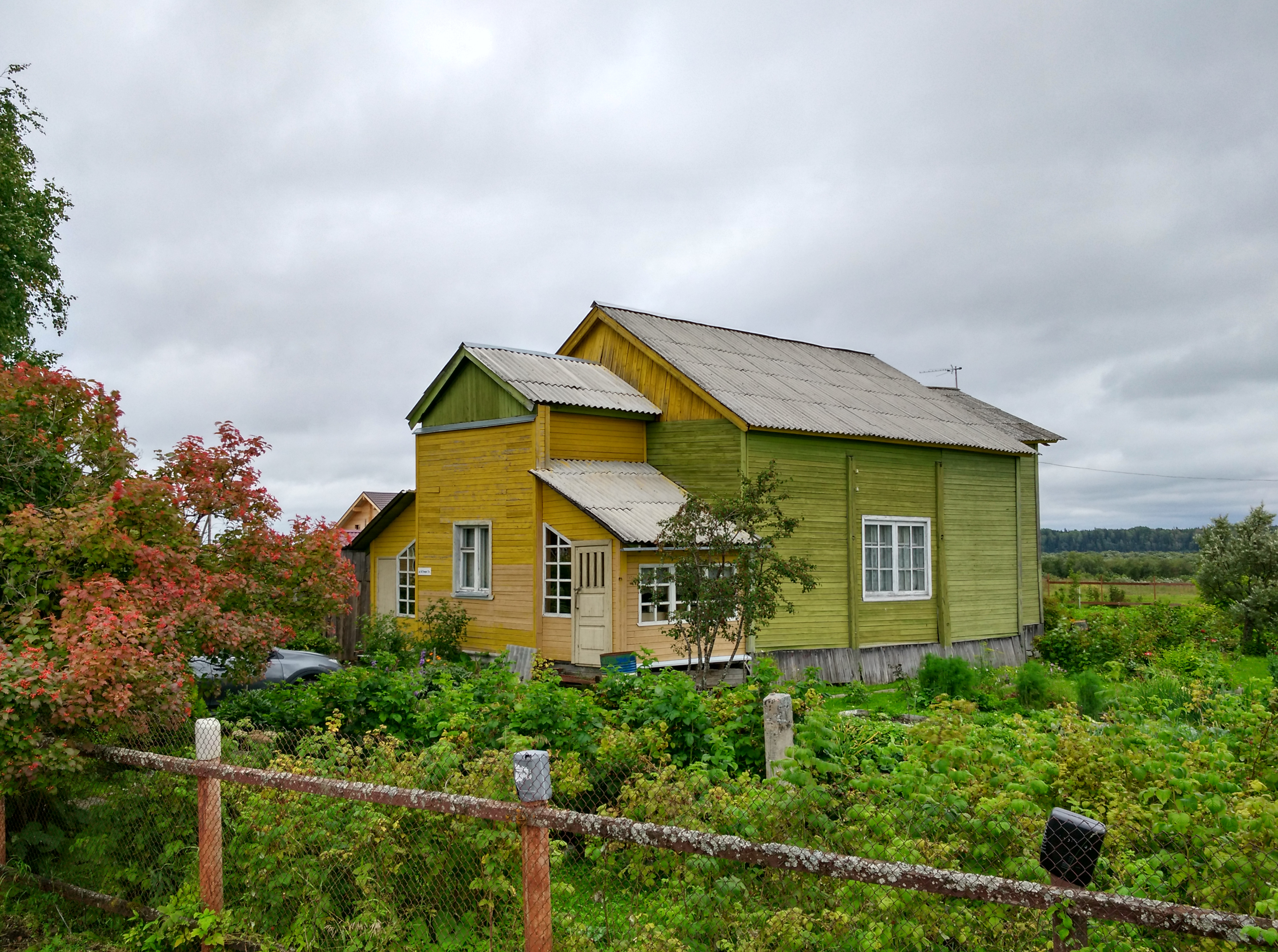 Церковь Флора и Лавра: дом 7А, Большая Товра (Матигорская с/а), Холмогорский район, Архангельская область